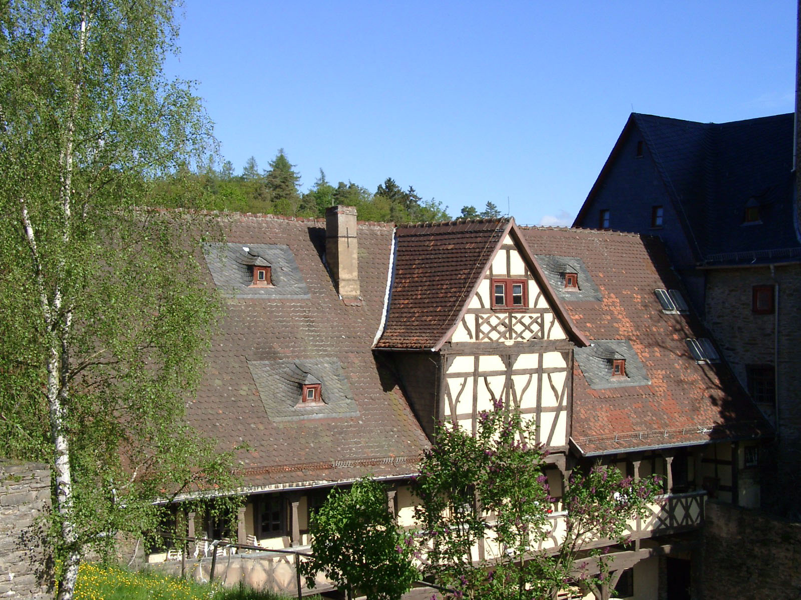 Schloss Kransberg Fachwerkhaus